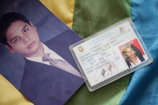 Cédula y documento de identidad de Diane Rodríguez